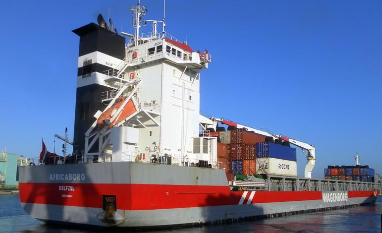 AFRICABORG